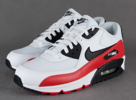 Nike Air Max '90 alebo Nike Air Max III